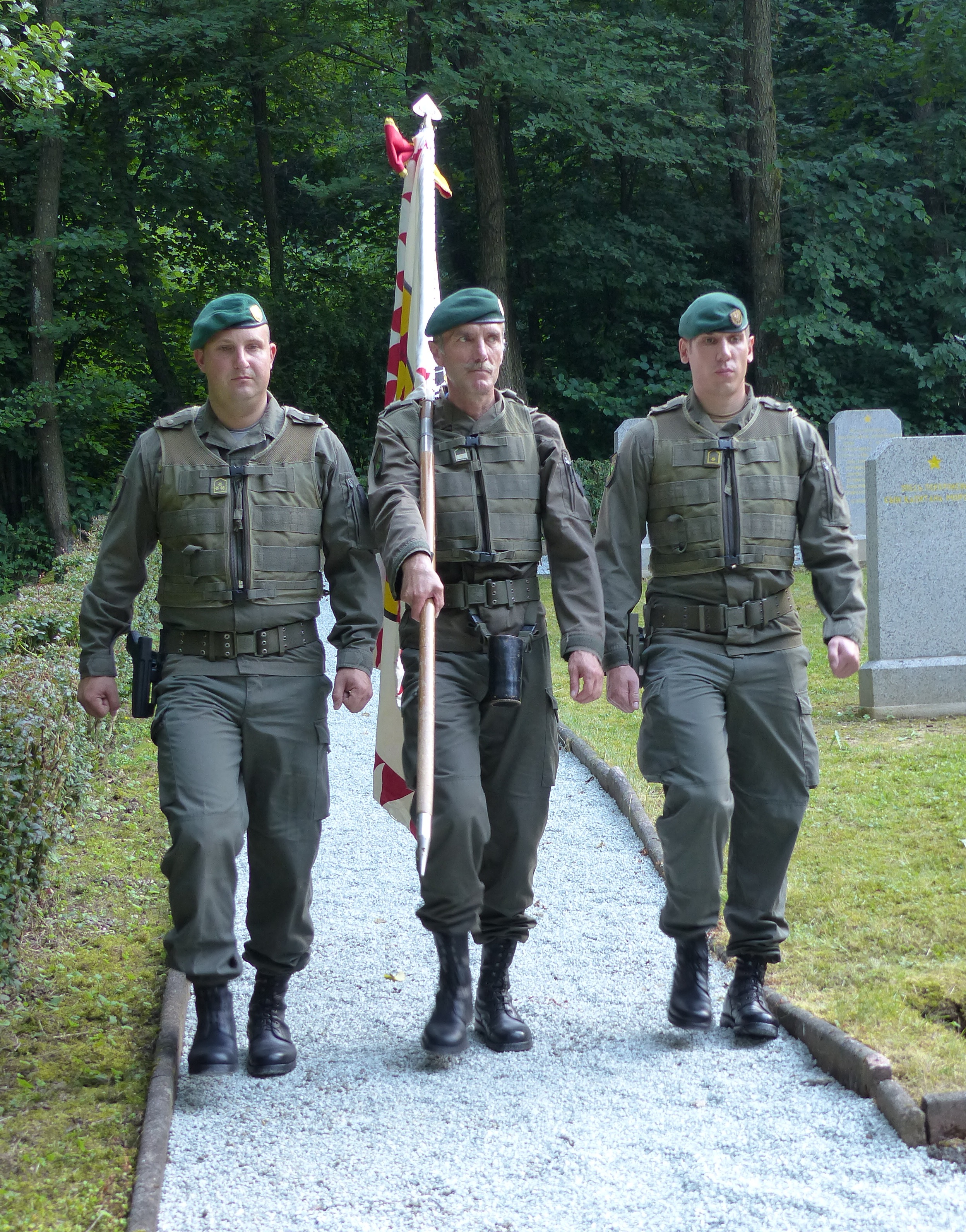 Begräbnis sowjetischer Soldaten 24. Juni 2016 - Fahnenträger des Bundesheeres